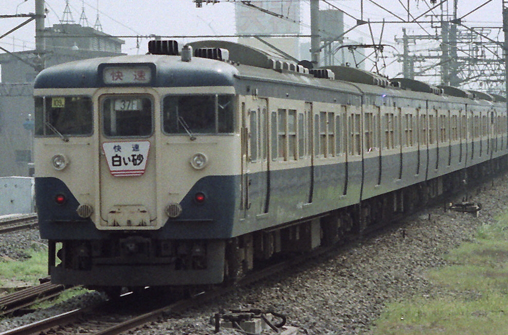 国鉄総武線錦糸町駅-1978年8月撮影-01